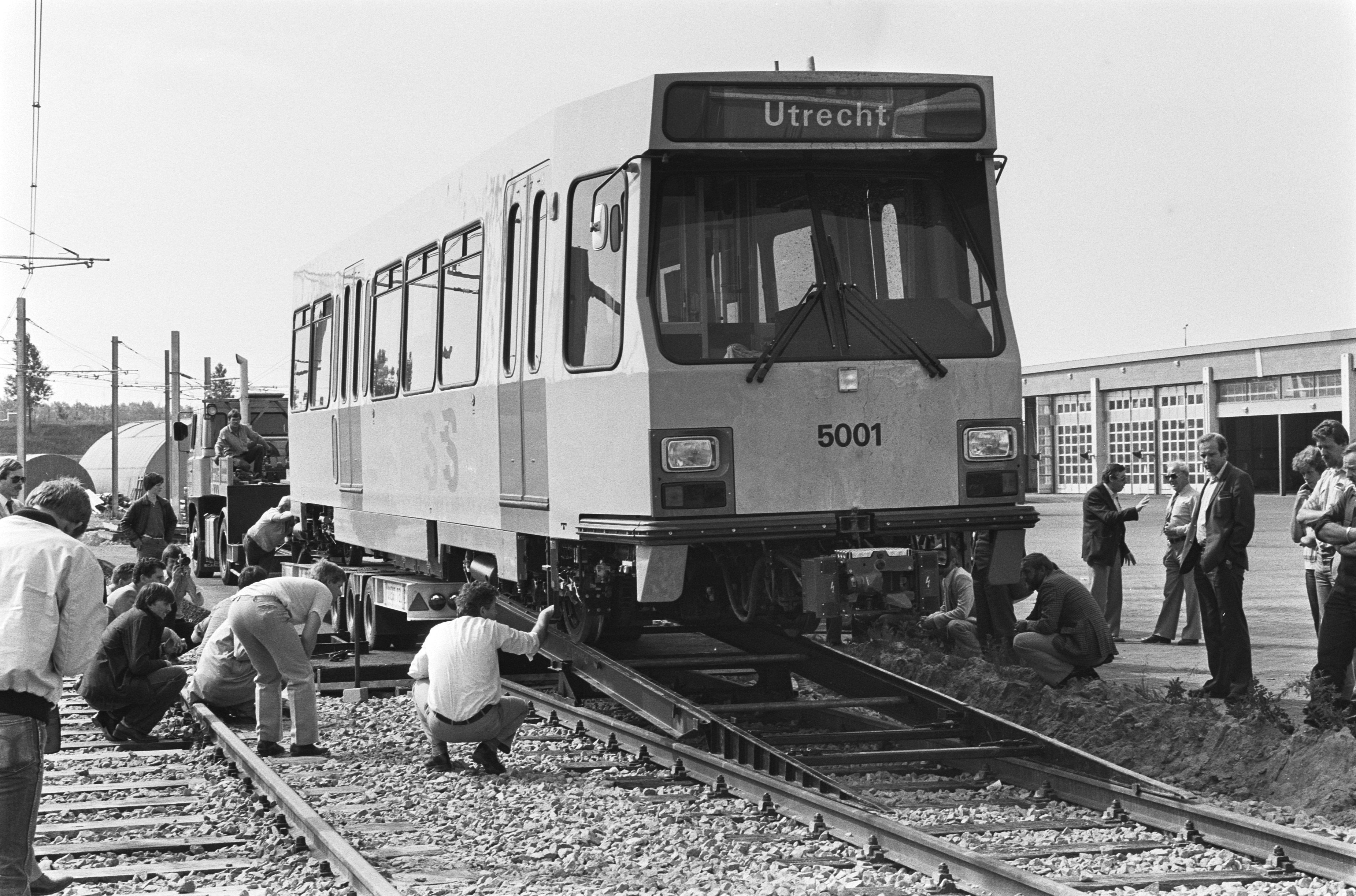 Collectie / Archief : Fotocollectie Anefo Reportage / Serie : [ onbekend ] Beschrijving : Eerste tramstel van sneltram Utrecht naar Nieuwegein word op rails gezet Datum : 17 juni 1982 Locatie : Utrecht Trefwoorden : RAILS, trams Fotograaf : Dijk, Hans van / Anefo Auteursrechthebbende : Nationaal Archief Materiaalsoort : Negatief (zwart/wit) Nummer archiefinventaris : bekijk toegang 2.24.01.05 Bestanddeelnummer : 932-2147 Reacties Geplaatst door Anoniem op 18 maart 2012 - 20:16. wordt